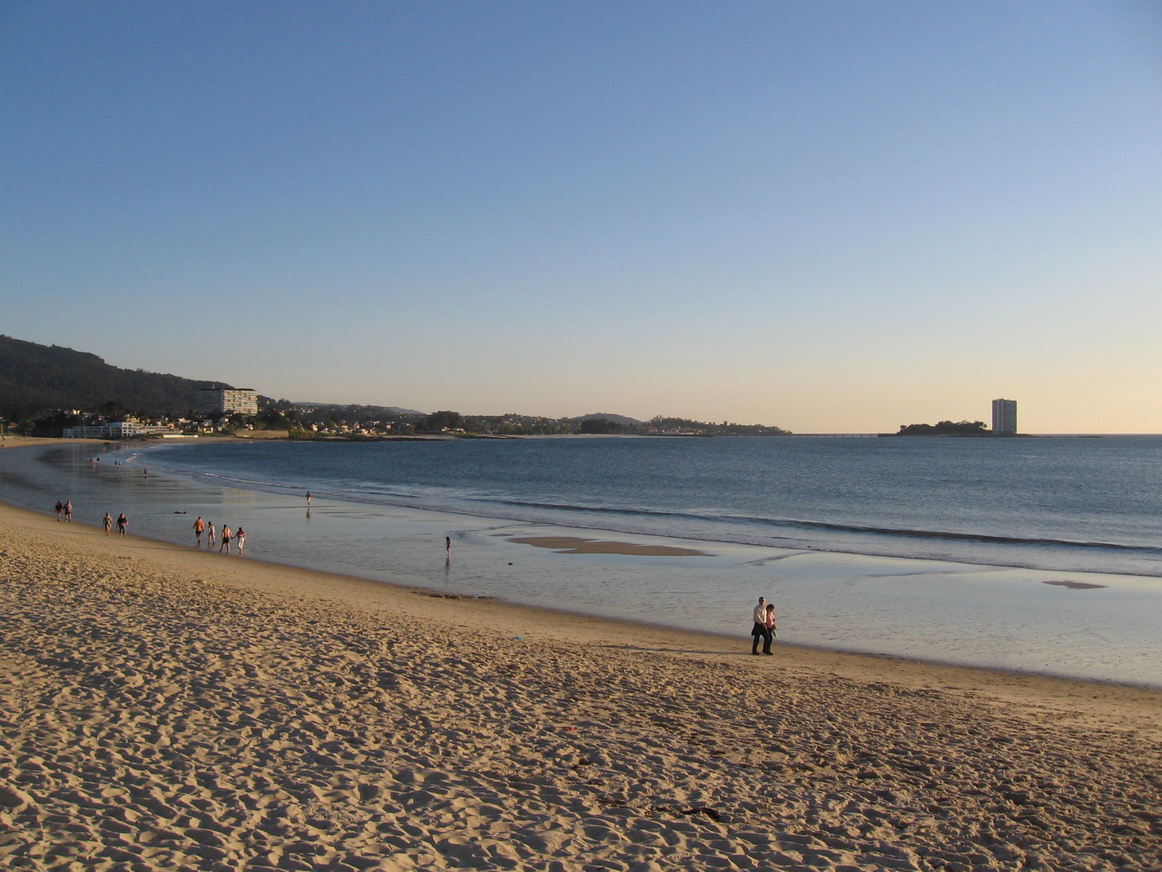 Praia de Samil coa Illa de Toralla ao fondo.